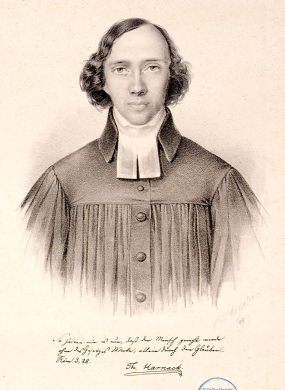 Theodosius Harnack (* 3. Januar 1817; † 23. September 1889), deutscher Theologe